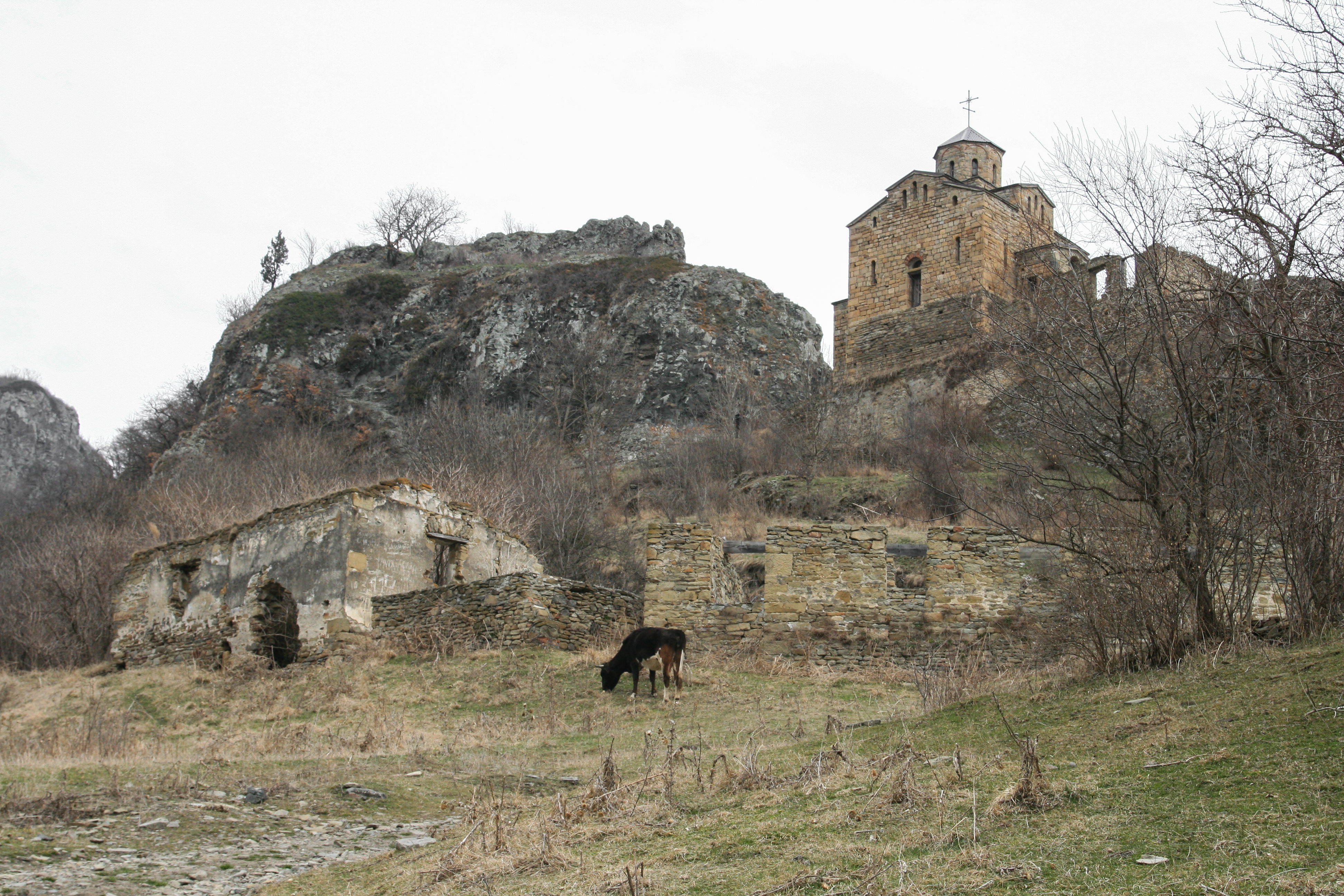 Шоанинский древнехристианский храм: (3 км южнее поселка, на горе Шоана), Коста Хетагурова, Карачаевский район, Кабардино-Балкария